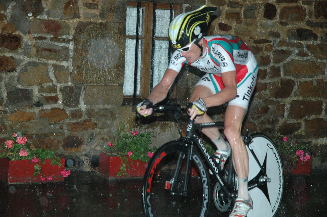 Vasil Kiryienka, Euskal Bizikleta 2007